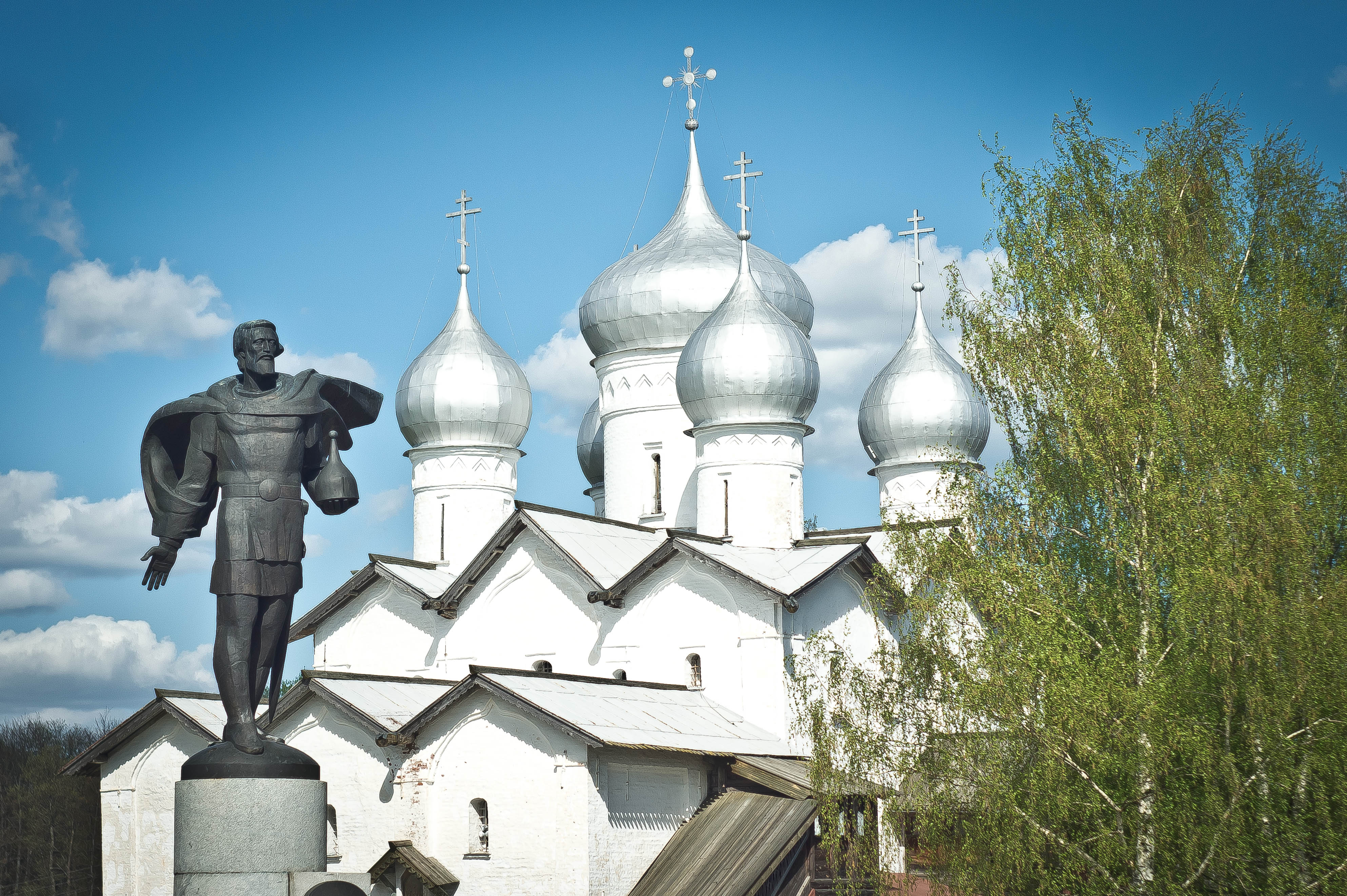 Церковь Бориса и Глеба в Плотниках (на Торговой стороне): набережная Александра Невского, Великий Новгород, Новгородская область